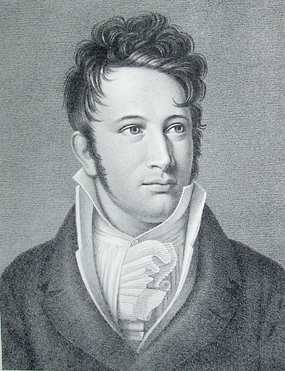 Adam Gottlob Oehlenschläger (1779-1850), dansk digter og forfatter af skuespil.